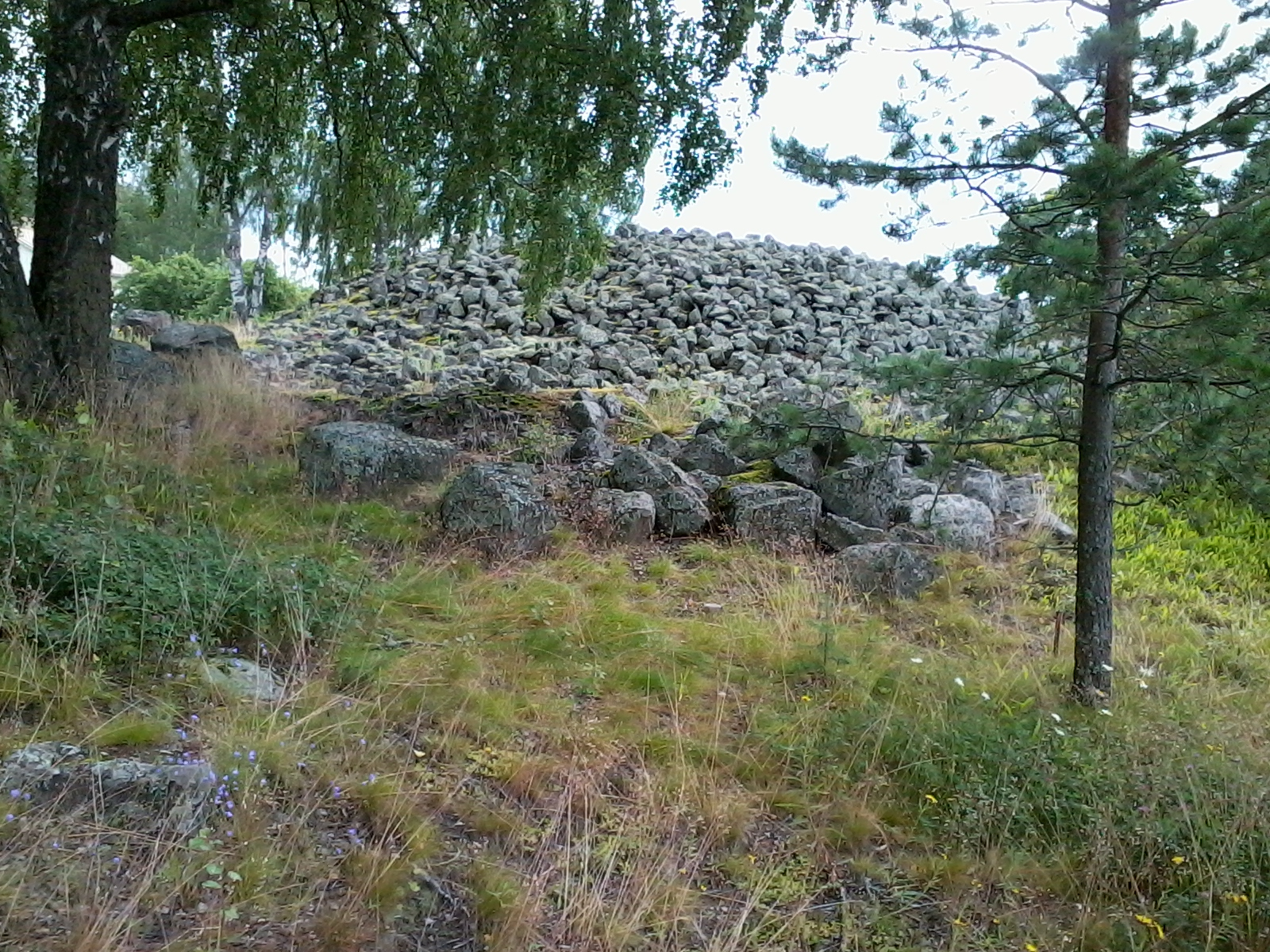 Hiidenkiuas Paneliassa, Kuninkaanhauta, pronssikausi